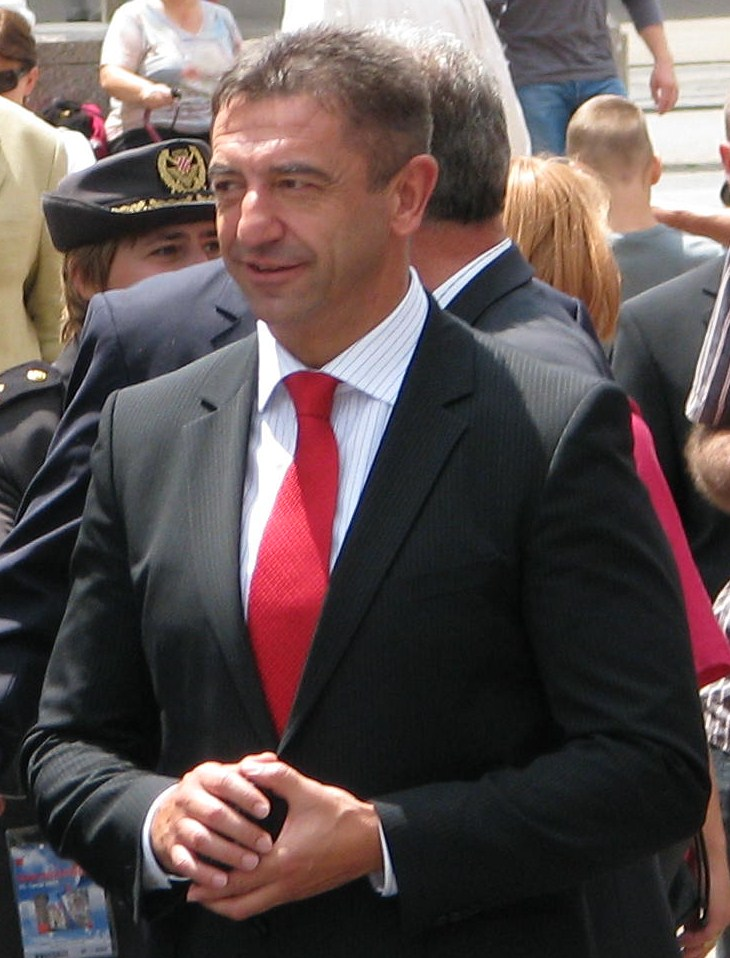 Darko Milinović